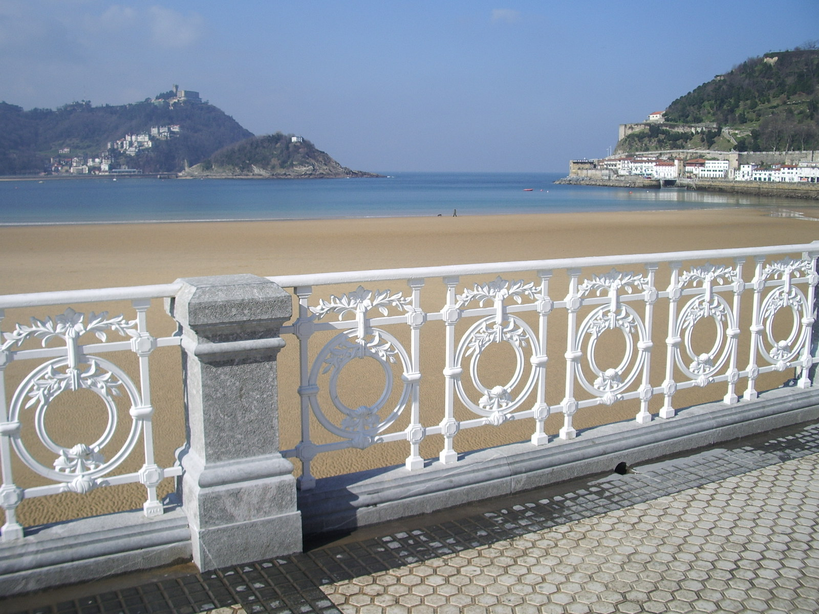 Kontxako eskubanda eta hondartza dira Donostiako ikur ezagunenak. Nik neuk egindako argazkia